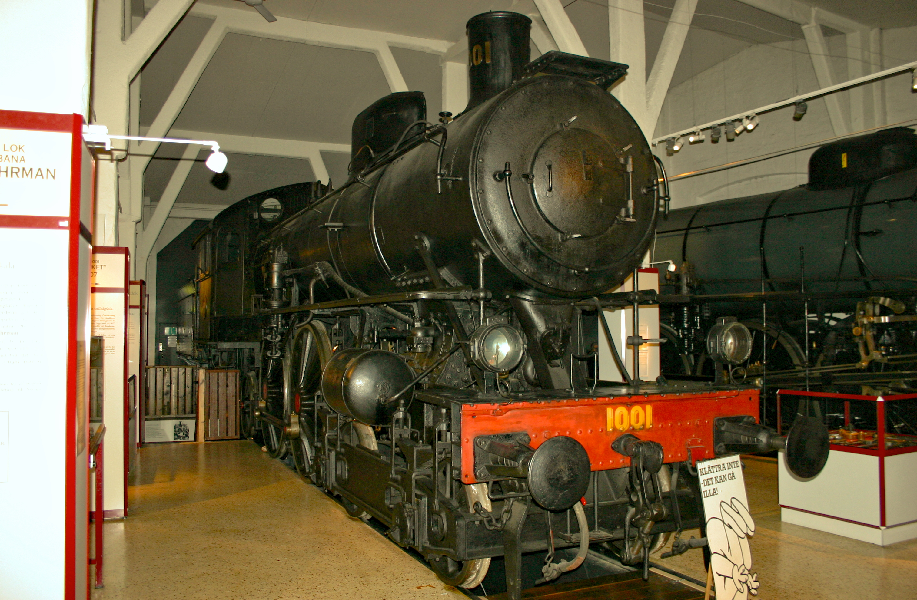 Dampflokomotive A 1001 Gävle 03.08.07